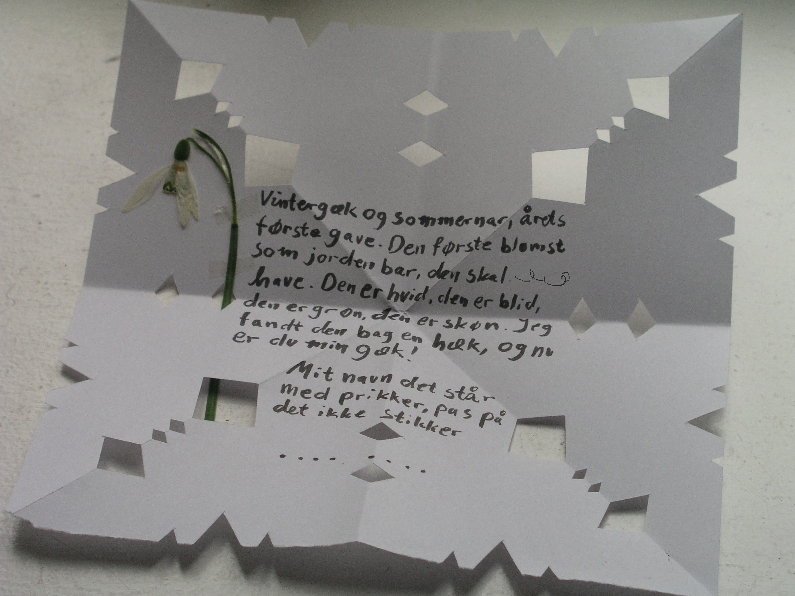 Gækkebrev (Danish Easter Letter)